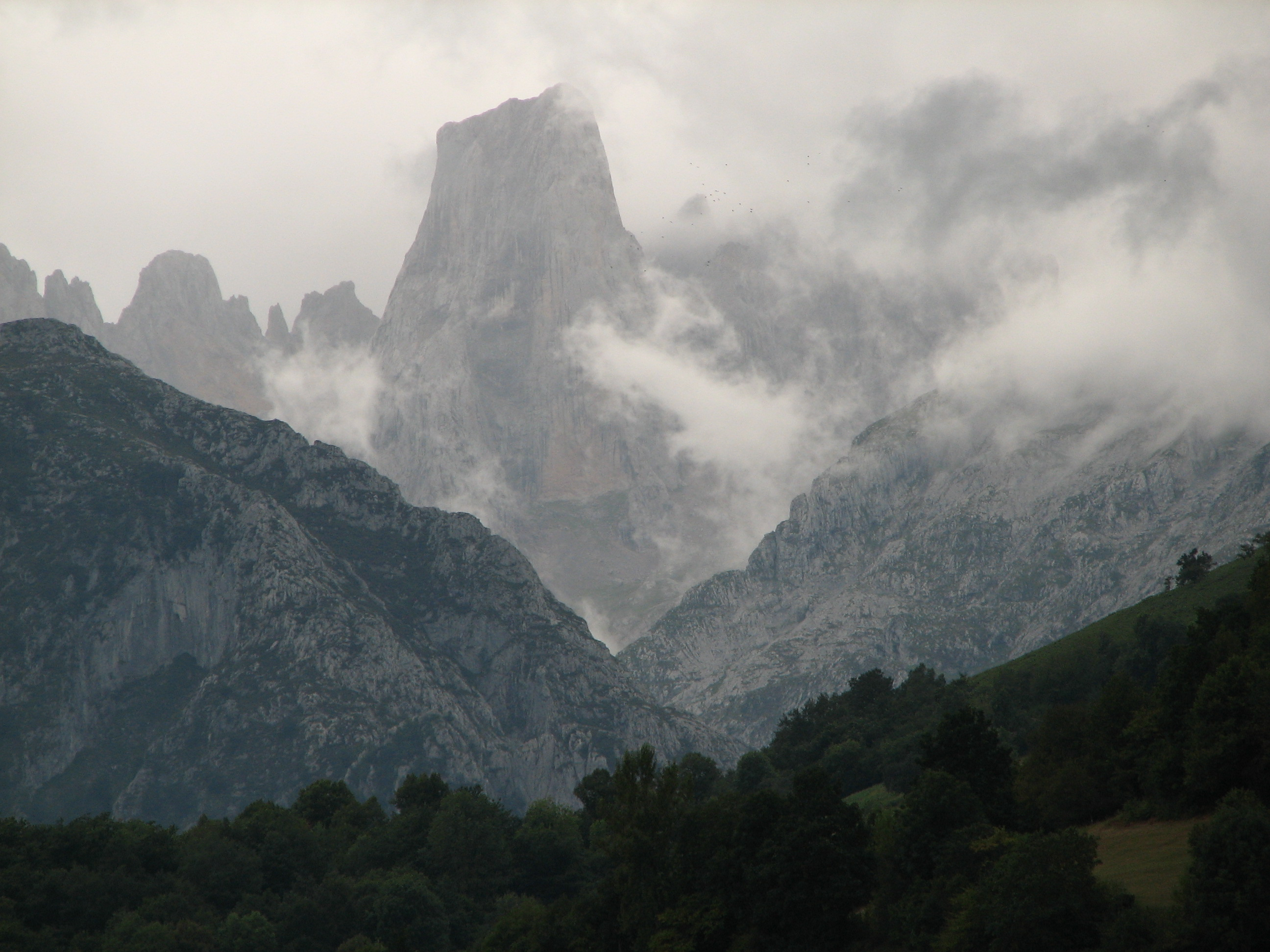 Naranjo de Bulnes desde el Mirador del Pozo de la Oración (Poo)